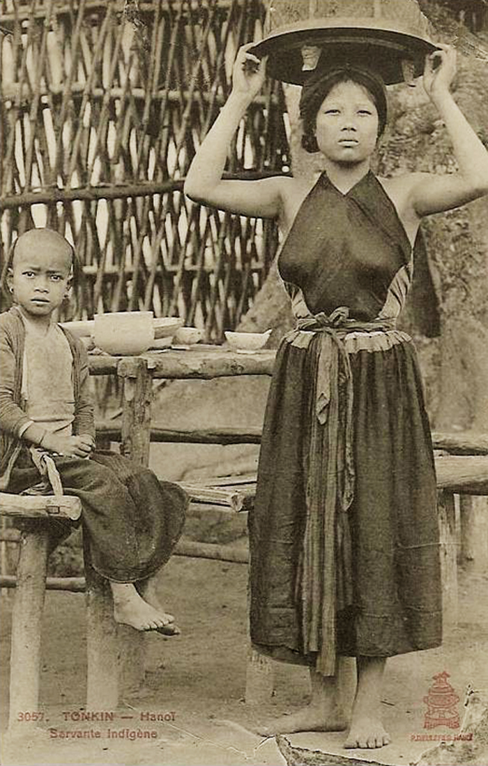 TONKIN - Hanoi - eingeborene Dienerin